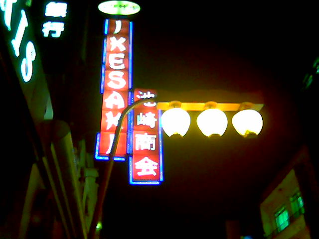 Letreiro da loja Ikesaki no bairro da Liberdade (tradicional reduto da comunidade japonesa) em São Paulo.